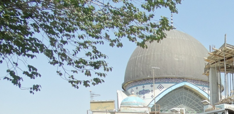 عکس از پارک مریم کنار میدان گرفته شده است